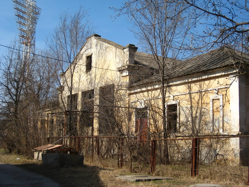 Здание бывшей Аудитории (вид сзади)